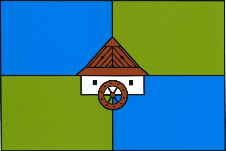 Vysočina (okres Chrudim), vlajka obce. Modro-zeleno čtvrcený list. Uprostřed bílý mlýn se dvěma černými okny, s hnědou dřevěnou střechou a kolem. Poměr šířky k délce listu je 2 : 3.